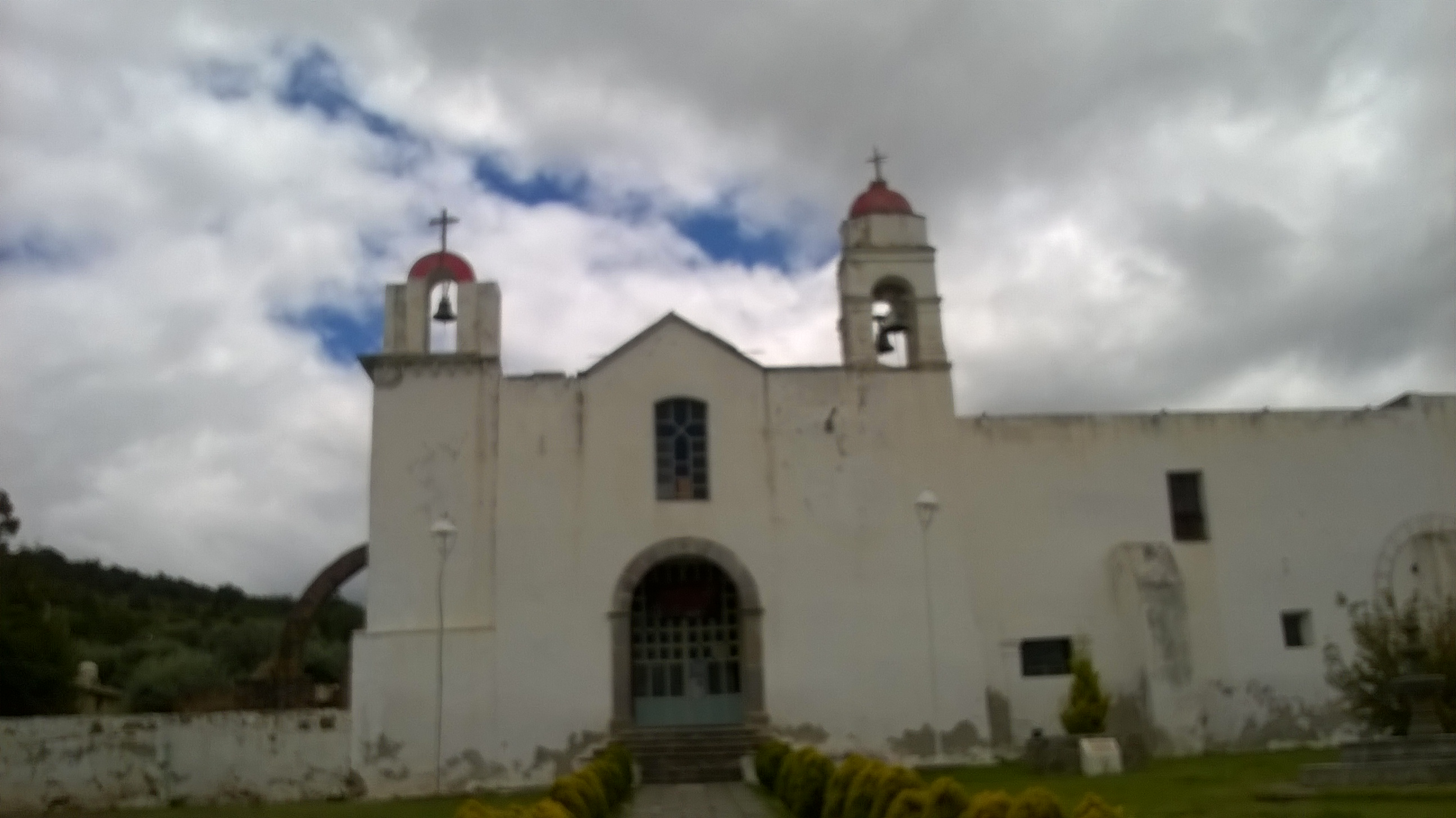 Parroquia de San Juan Bautista, Atlangatepec